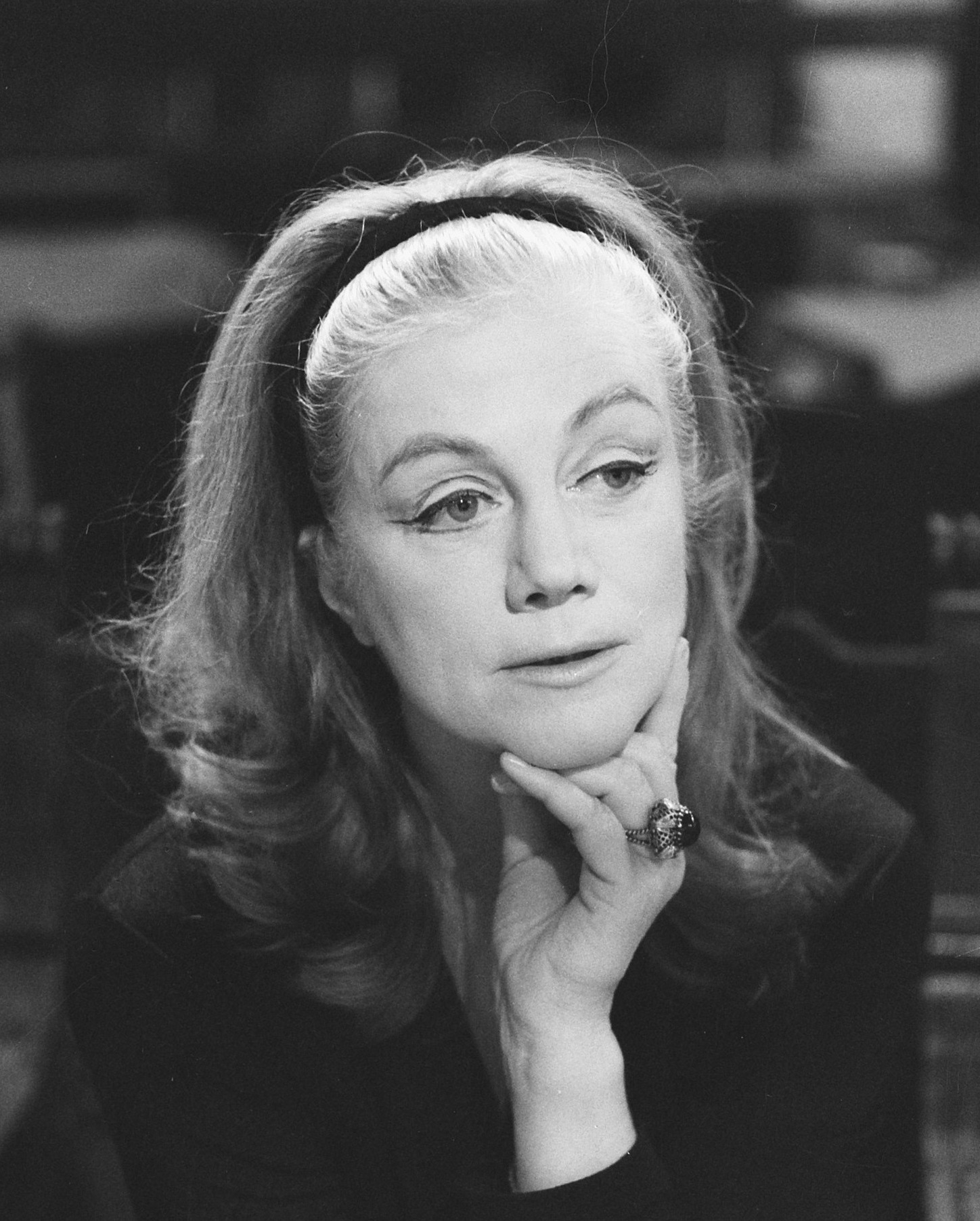 Britse actrice en danseres Sara Churchill in het Mickery-theater te Loenersloot